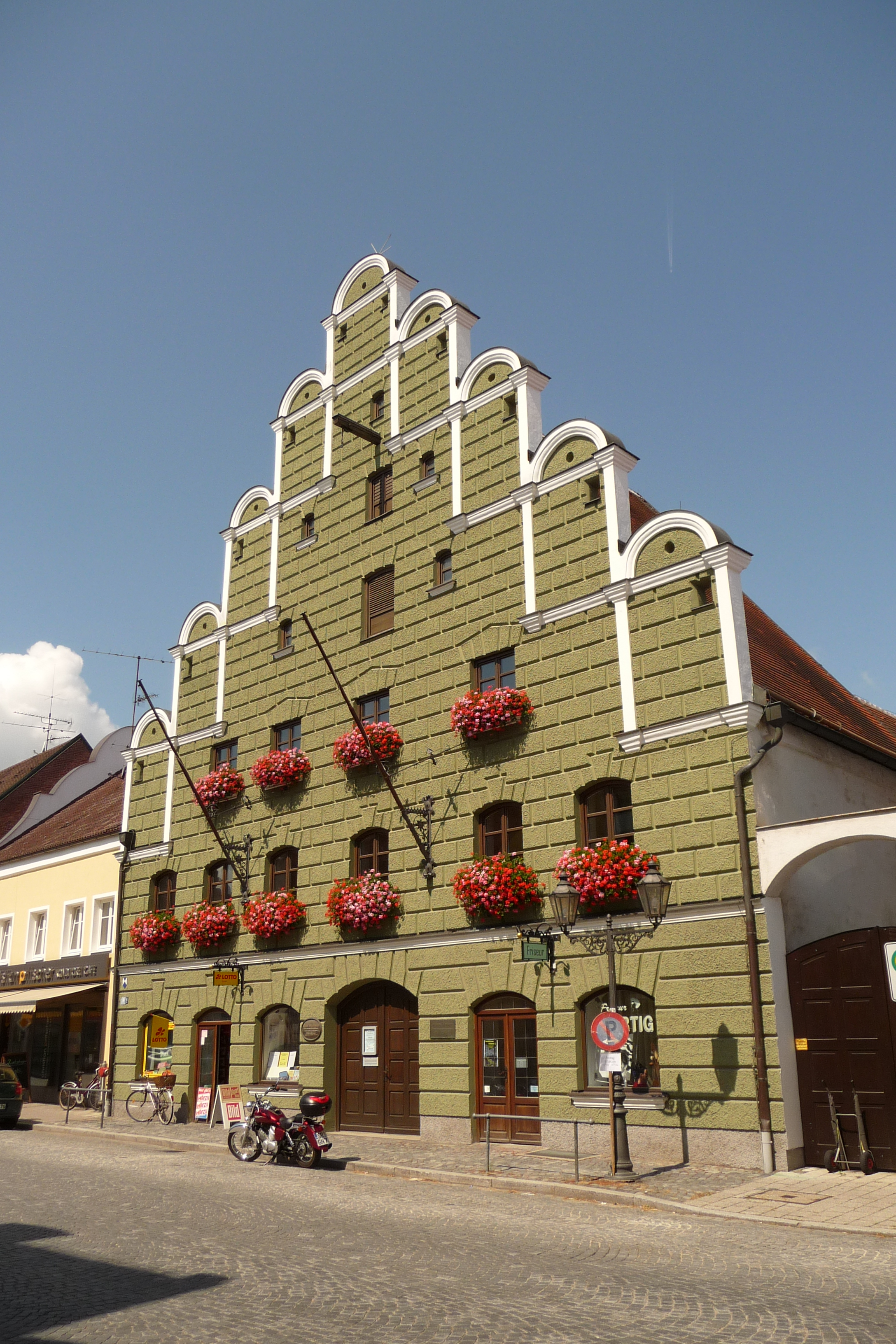 Das Loichingerhaus (Städtisches Bürgerhaus) in Geiselhöring, Stadtplatz 18